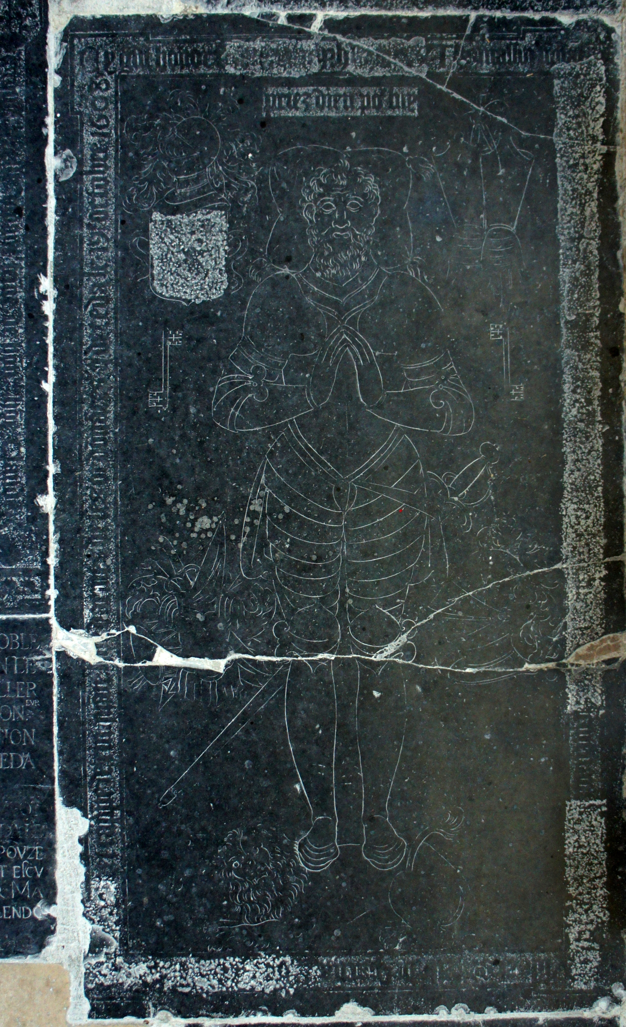 dalle funéraire de Philippe de Thomassin.